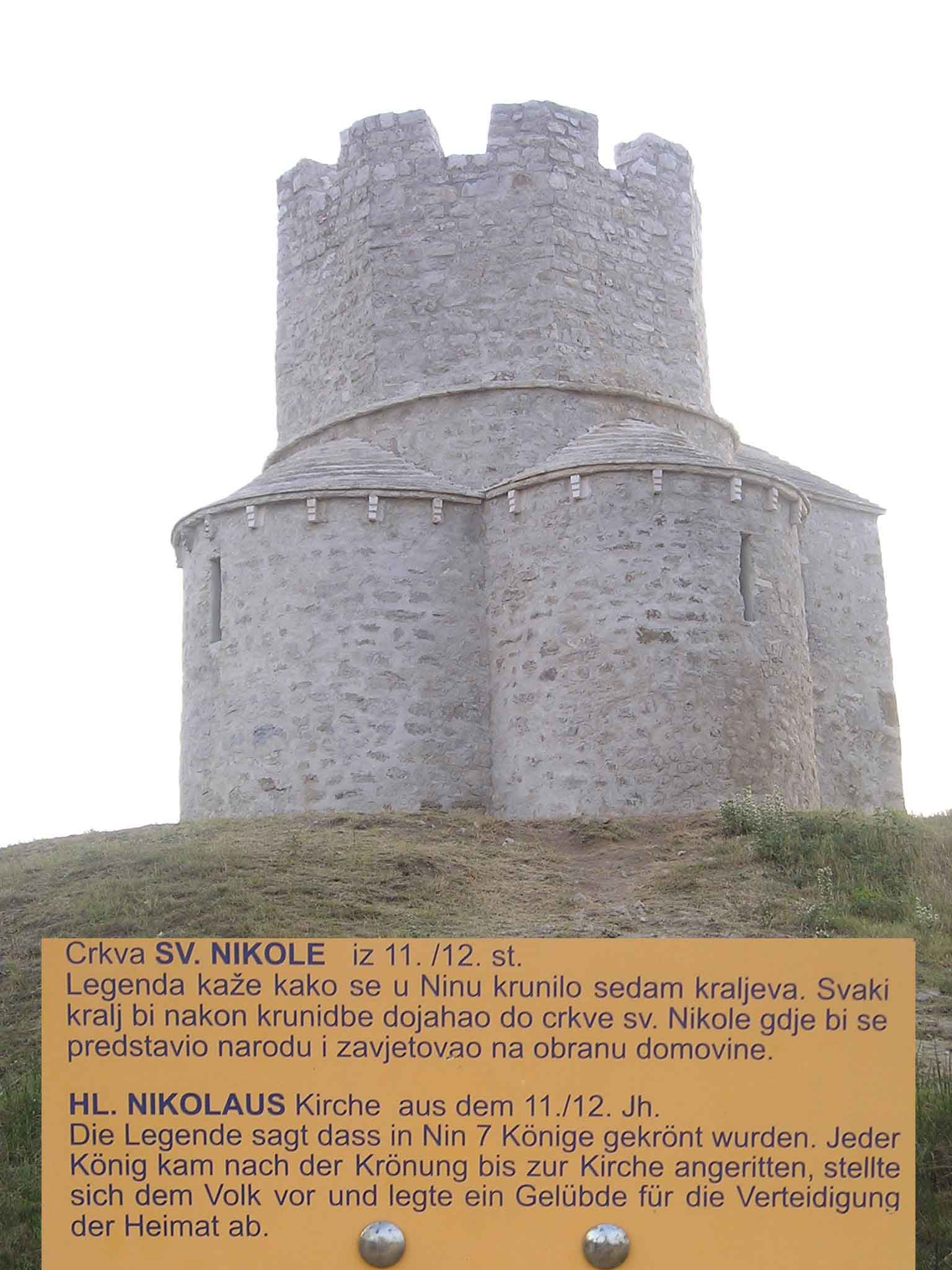 HL. Nikolaus Kirche aus dem 11. / 12. Jahrhundert. Die Legende sagt, dass in Nin sieben Könige gekrönt wurden. Jeder König kam nach der Krönung bis zur Kirche angeritten, stellte sich dem Volk vor und legte ein Gelübde für die Verteidigung der Heimat ab.